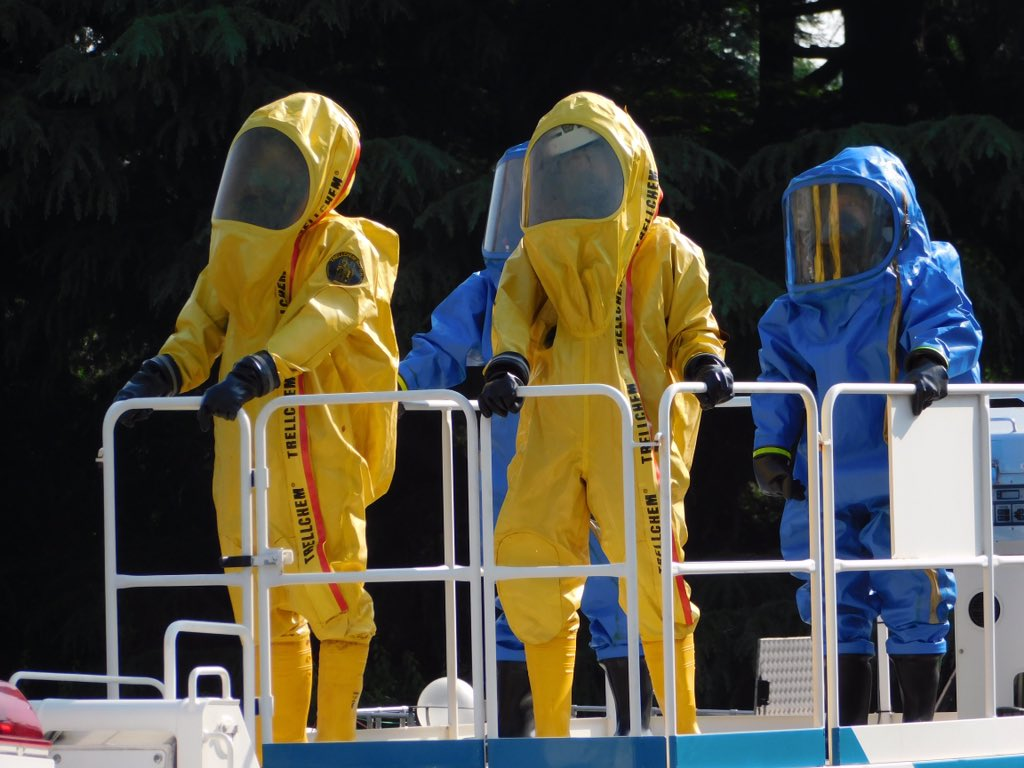 警視庁機動隊の化学防護隊。2017年機動隊観閲式で撮影。